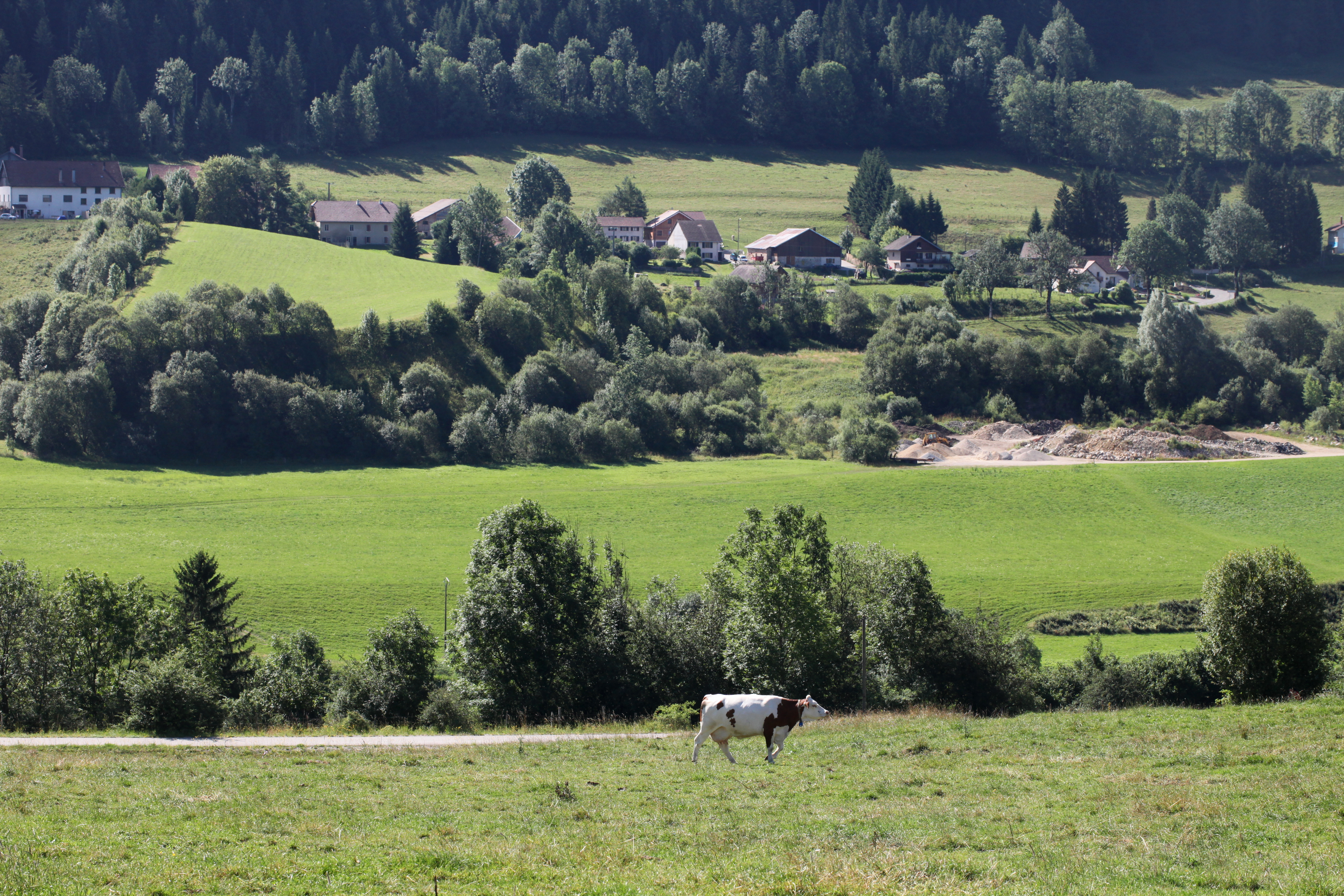 Hauterive vu de Montflovin.